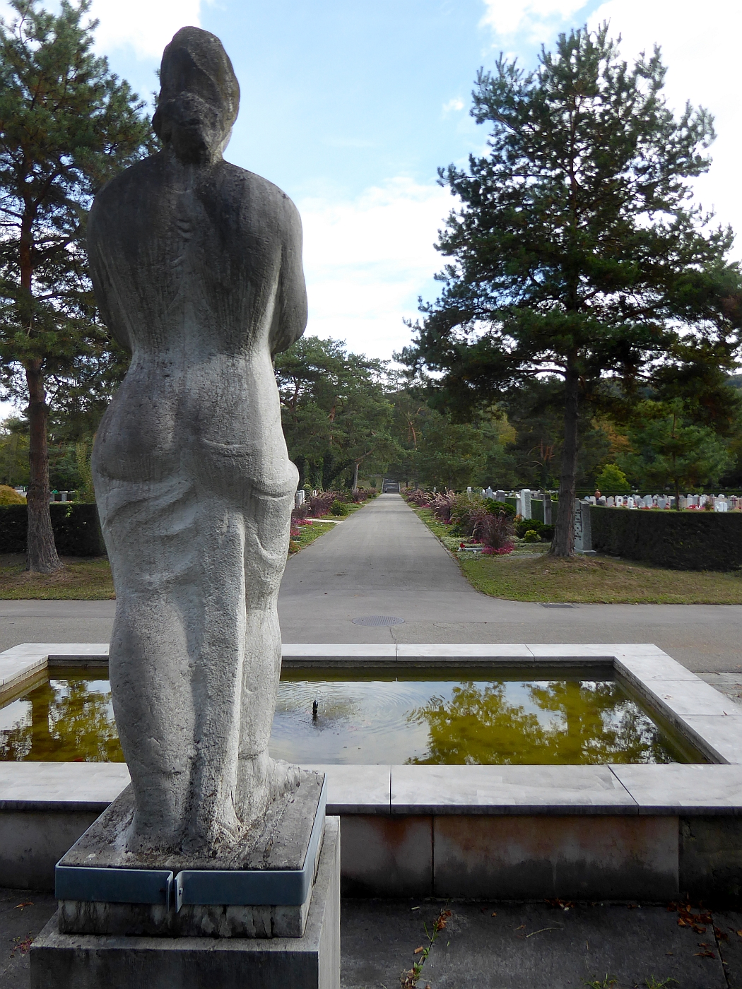 Carl Gutknecht (1878–1970) Bildhauer, Frauenfigur von 1956 auf dem Friedhof am Hörnli